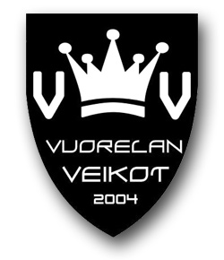 Vuorelan Veikot ry:n virallinen logo